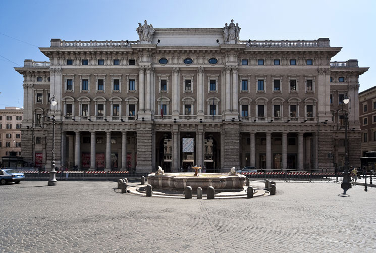 Galleria Alberto Sordi su Piazza Colonna Roma